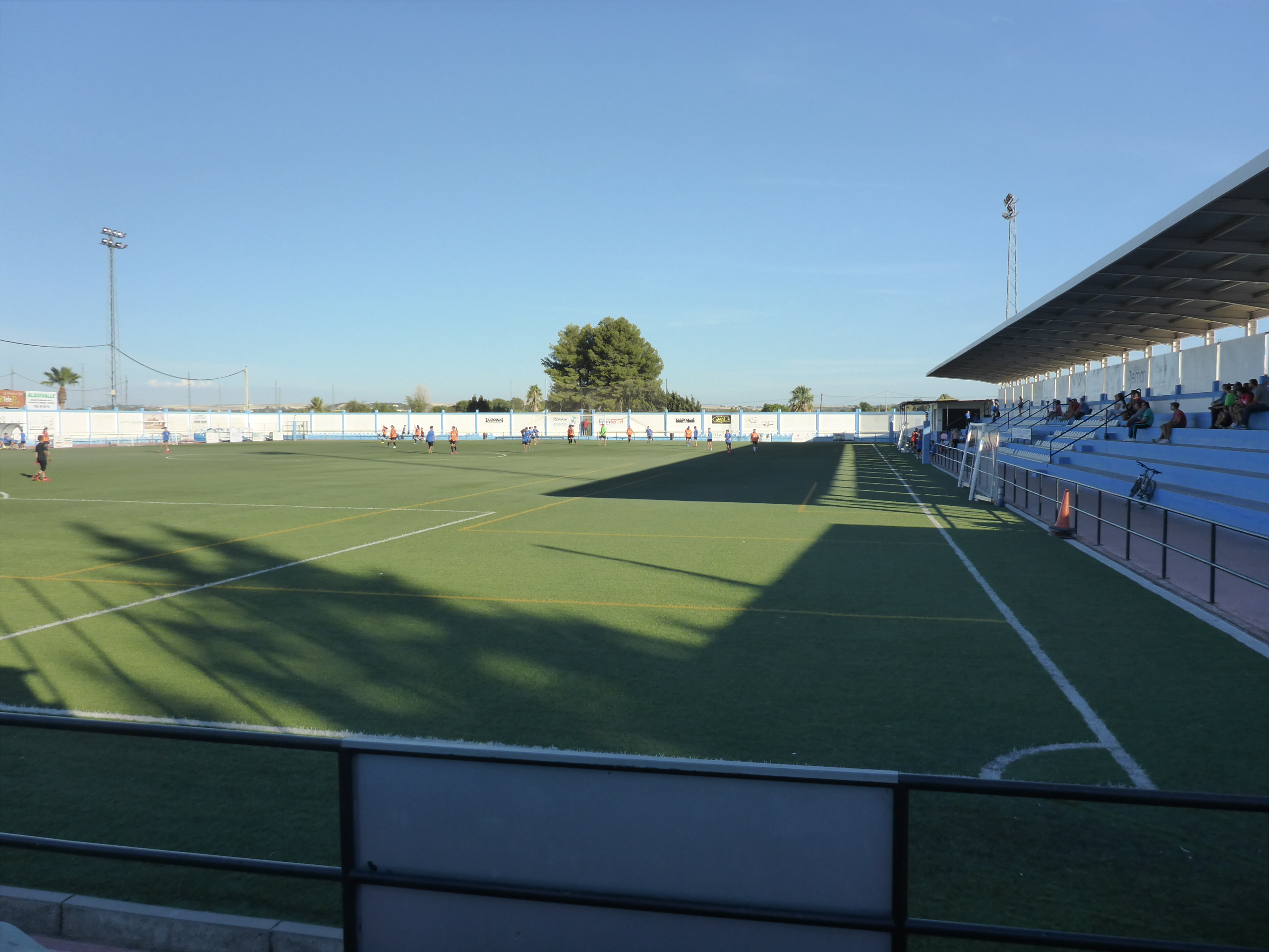 Guadalcacín, Jerez (Andalucia, España)